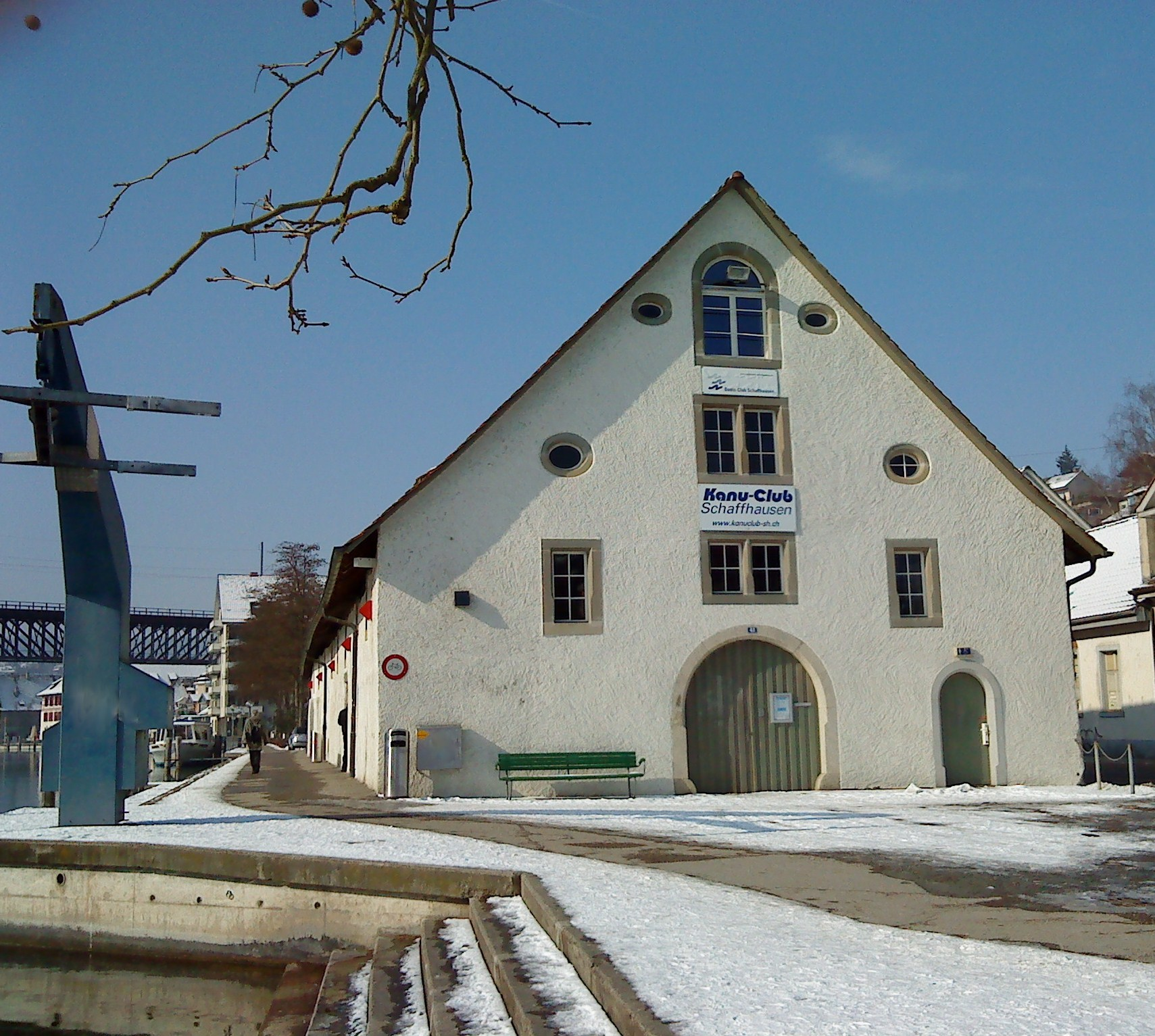 Ostansicht des historischen Salzstadels in Schaffhausen/CH.